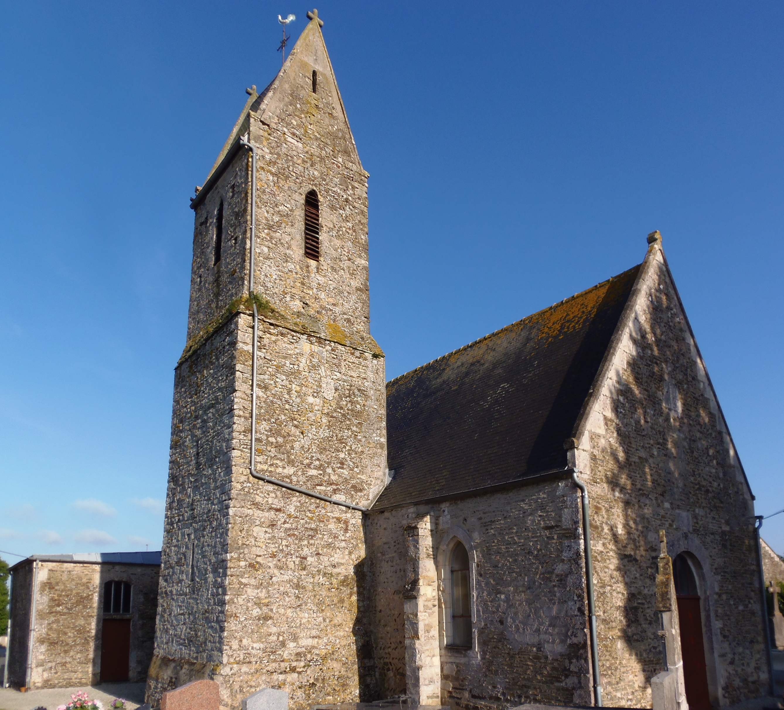 Orbois (Normandie, France). L'église Saint-Pierre d'.